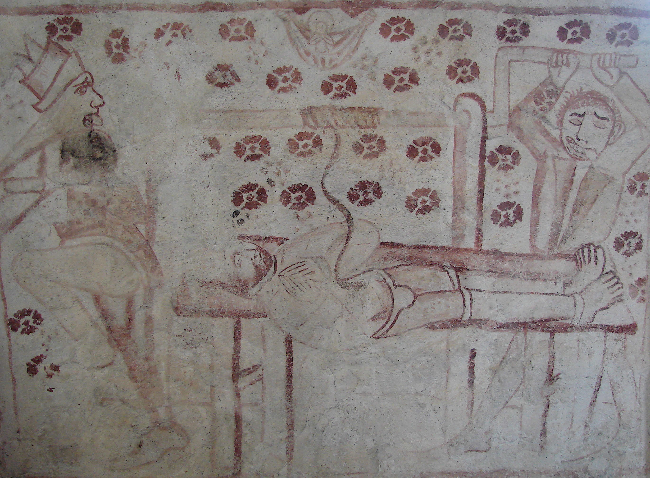 Båstad kirke, Bådsted, Sct. Erasmus' martyrium